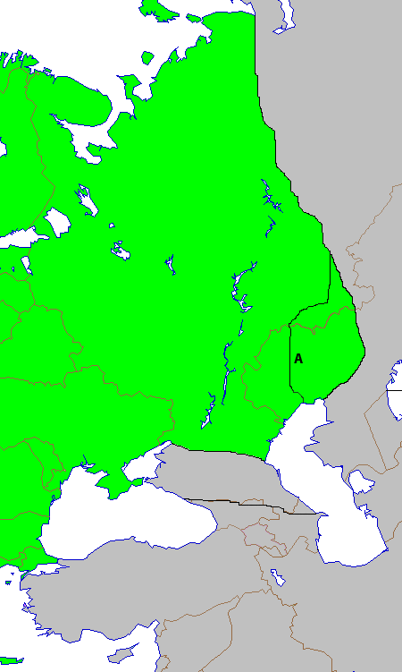 Confine fra Europa e Asia definito da Philip Johan von Strahlenberg